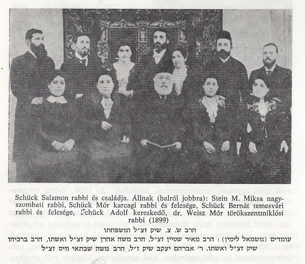 הרב שלמה צבי שי"ק ובני משפחתו הרב שלמה צבי שי"ק עם צאצאיו: משמאל: הרב מאיר שטיין ואשתו אנטוניה שי"ק; הרב משה אהרון שי"ק ואשתו הנריאטה הרב ברכיהו שי"ק ואשתו שרה; הרב אברהם יעקב שי"ק ואשתו יסכה; הרב ד"ר משה שבתאי וייס ואשתו שרה שי"ק